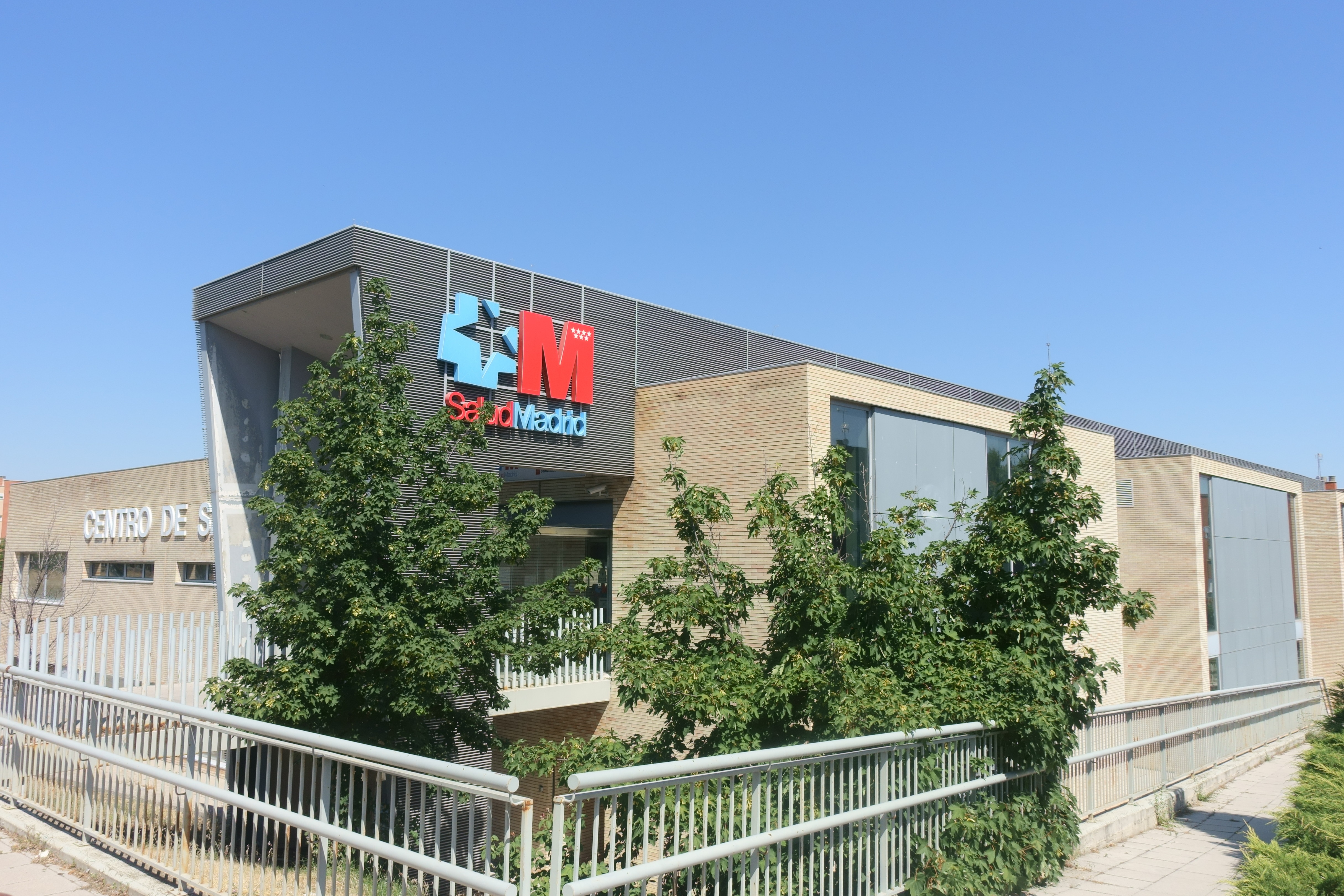 Centro de salud Las Olivas, en Aranjuez (Madrid, España).